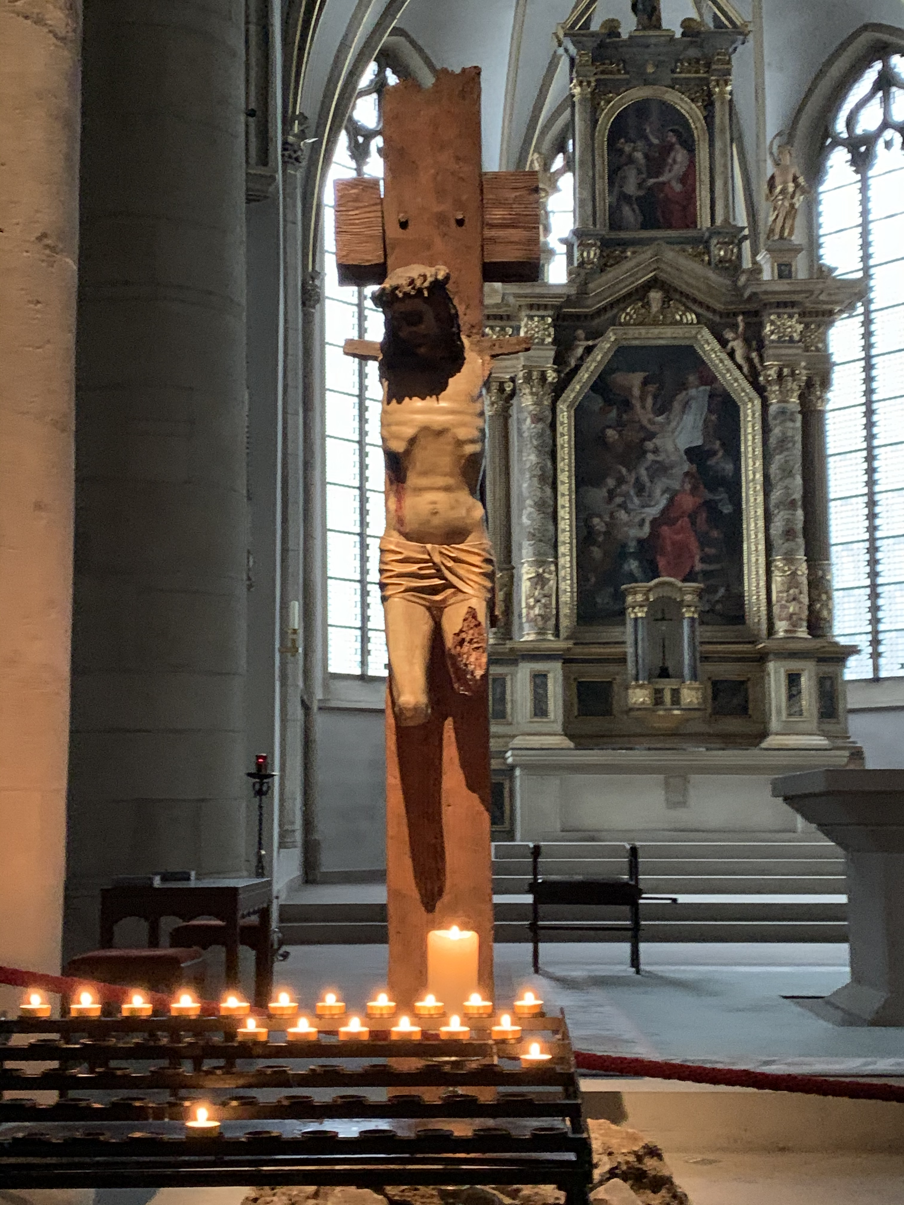 Dieser 1944 kriegszerstörte Christus-Korpus, steht in der Propsteikirche Recklinghausen vor dem Altar.